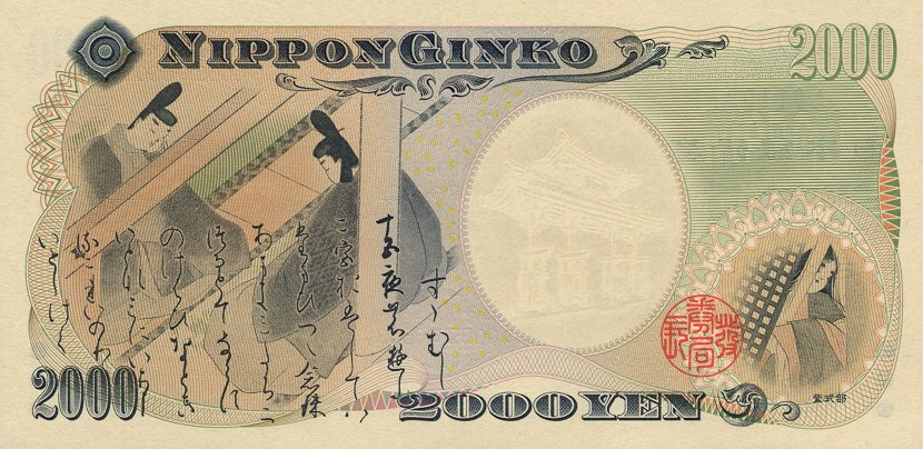 2000 Yen banknote with The Tale of Genji (taken from the Genji Monogatari Emaki) and Murasaki Shikibu (taken from the Murasaki Shikibu Diary Emaki).